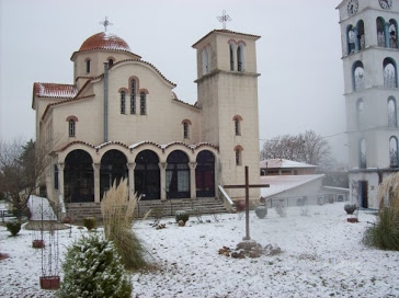 ΙΕΡΟΣ ΝΑΟΣ ΑΓΙΩΝ ΑΝΑΡΓΥΡΩΝ ΝΕΩΝ ΚΕΡΔΥΛΛΙΩΝ